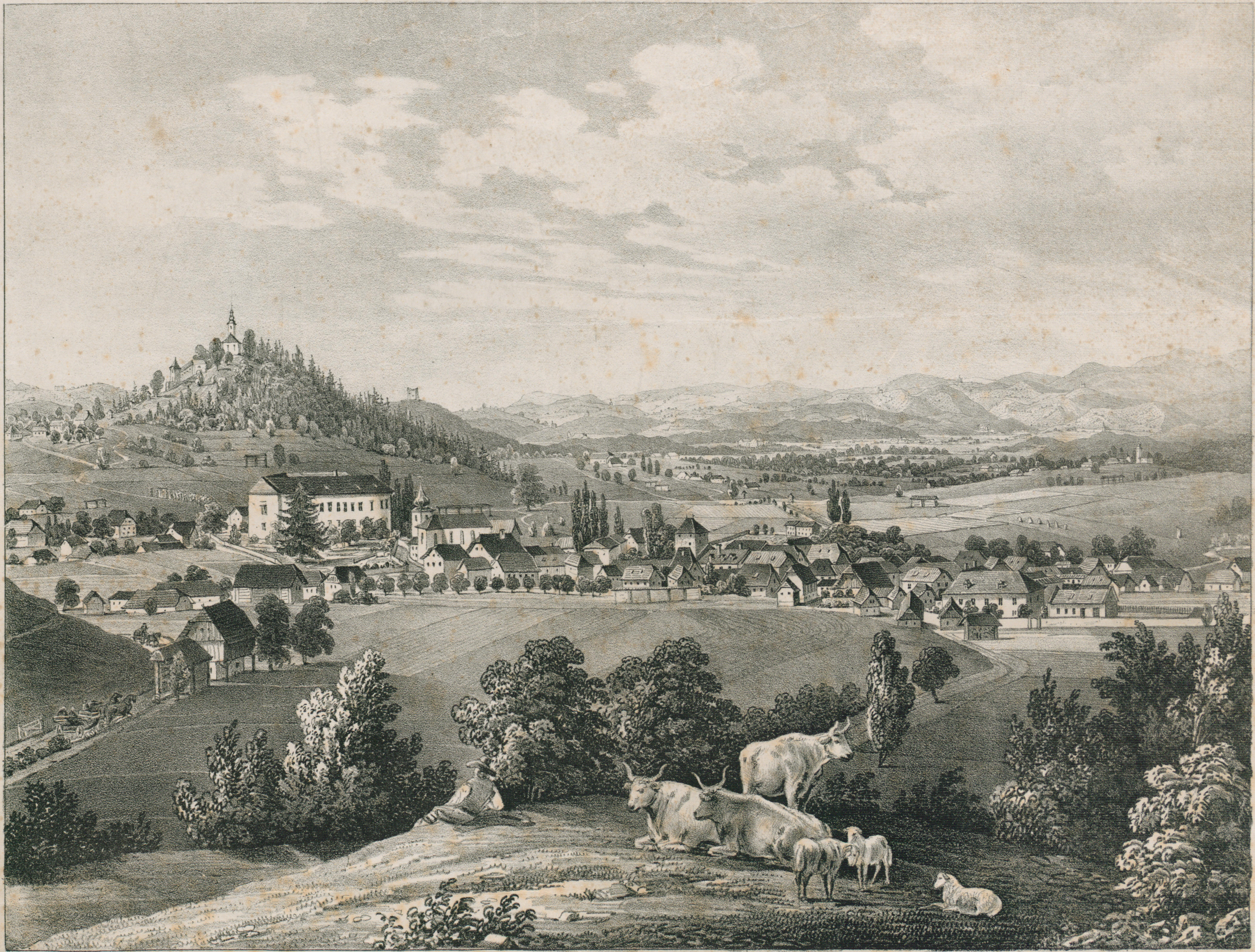 Litografija Mokronoga iz zbirke Malerische Ansichten aus Krain.